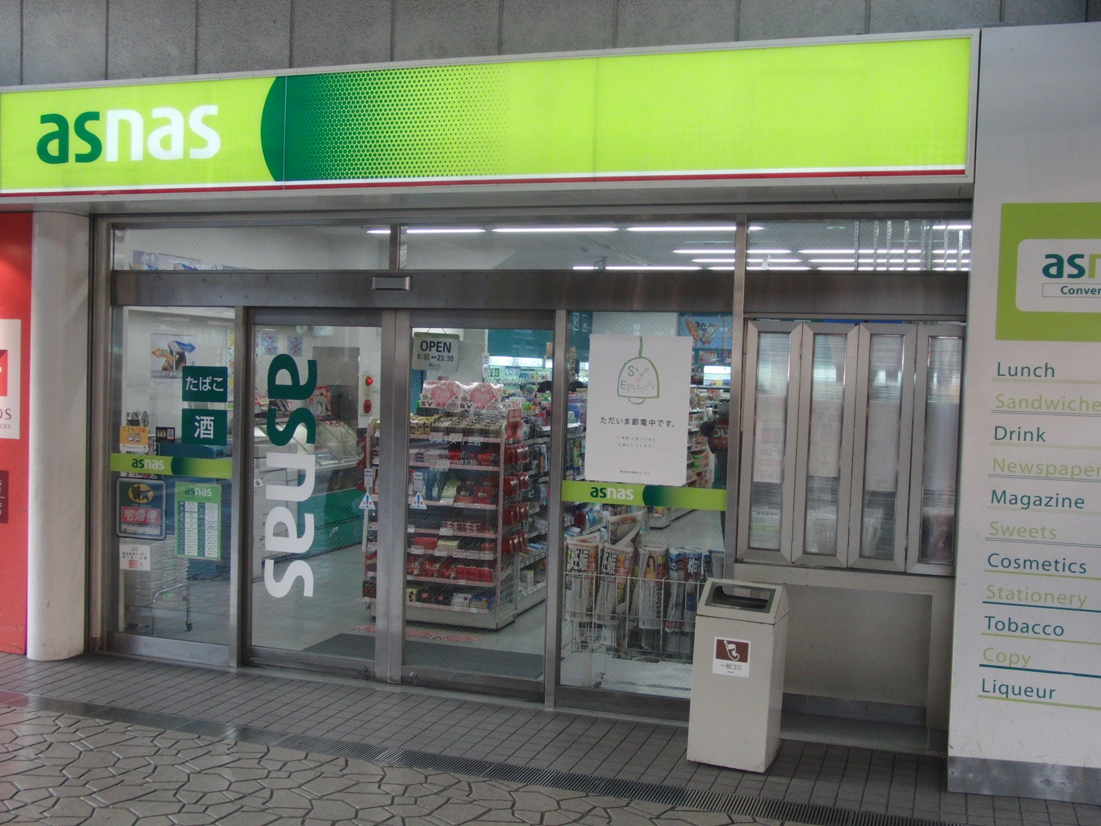 アズナス十三店を撮影